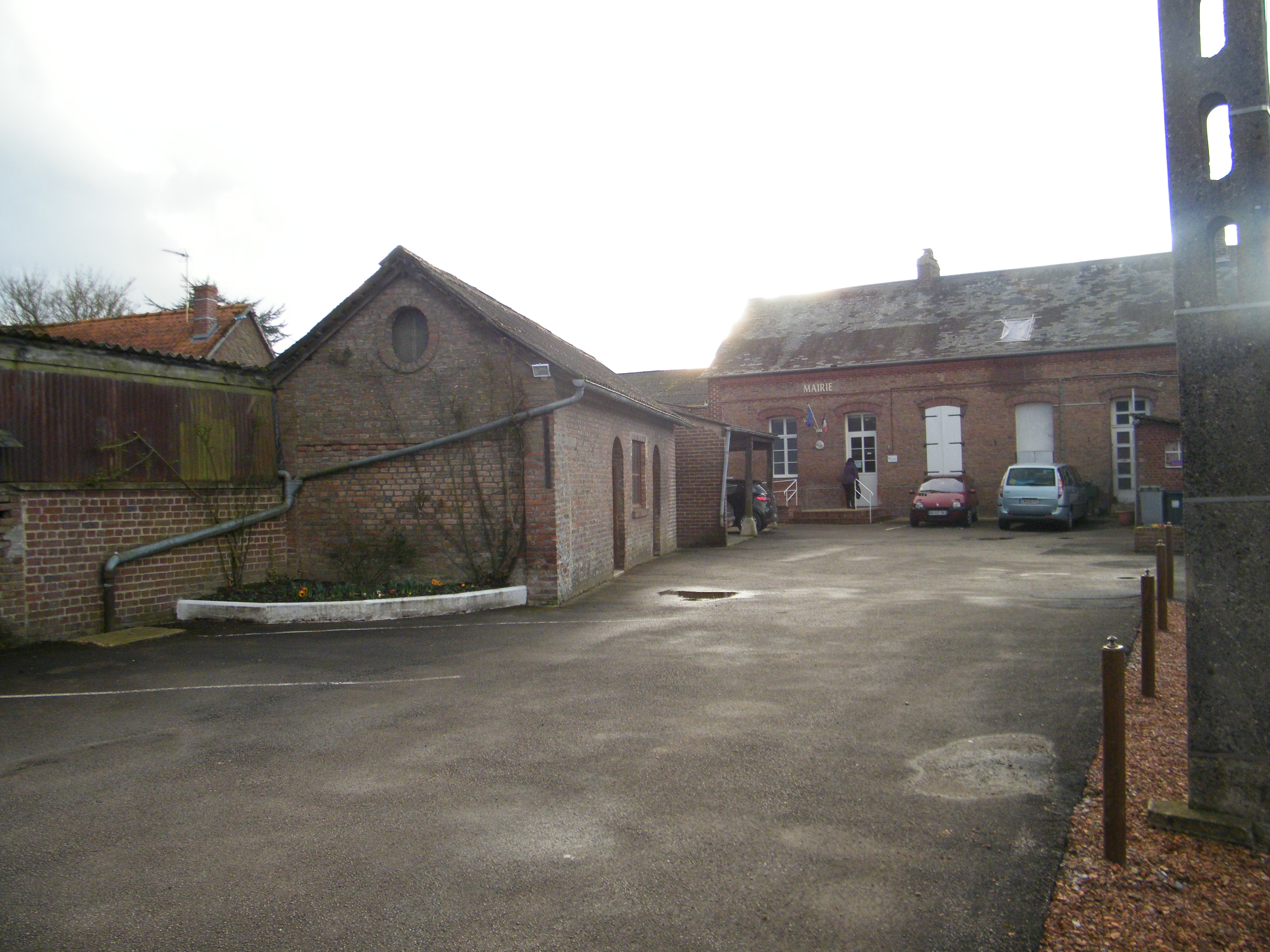 La mairie, l'ancienne école.